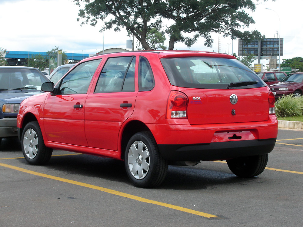 Volkswagen Gol Plus 2007.